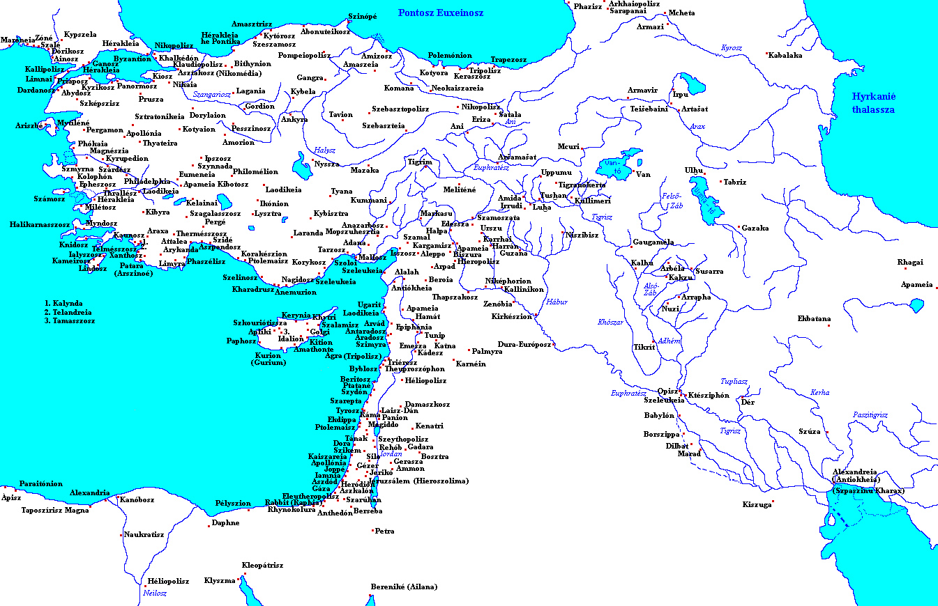 Anatólia térképe az ógörög korban